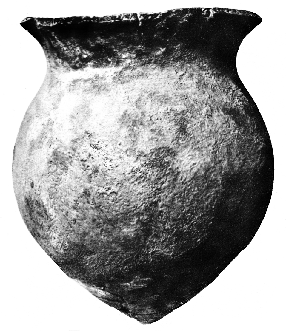 Gefäß der Ertebølle-Kultur aus Rüder-Moor, Schleswig-Holstein